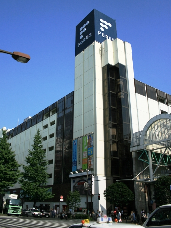 Description 仙台フォーラス Forus's Sendai store. Sendai, JapanLocation宮城県仙台市青葉区 GFDL,cc-by-sa-3.0,2.5,2.0,1.0 仙台フォーラス Forus's Sendai store. Sendai, Japan